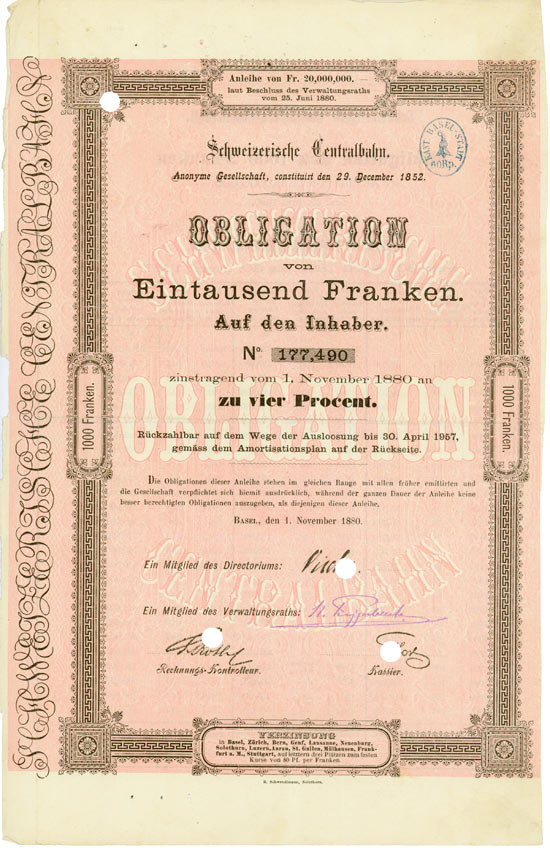 Obligation über 1000 Franken der Schweizerischen Centralbahn vom 1. November 1880